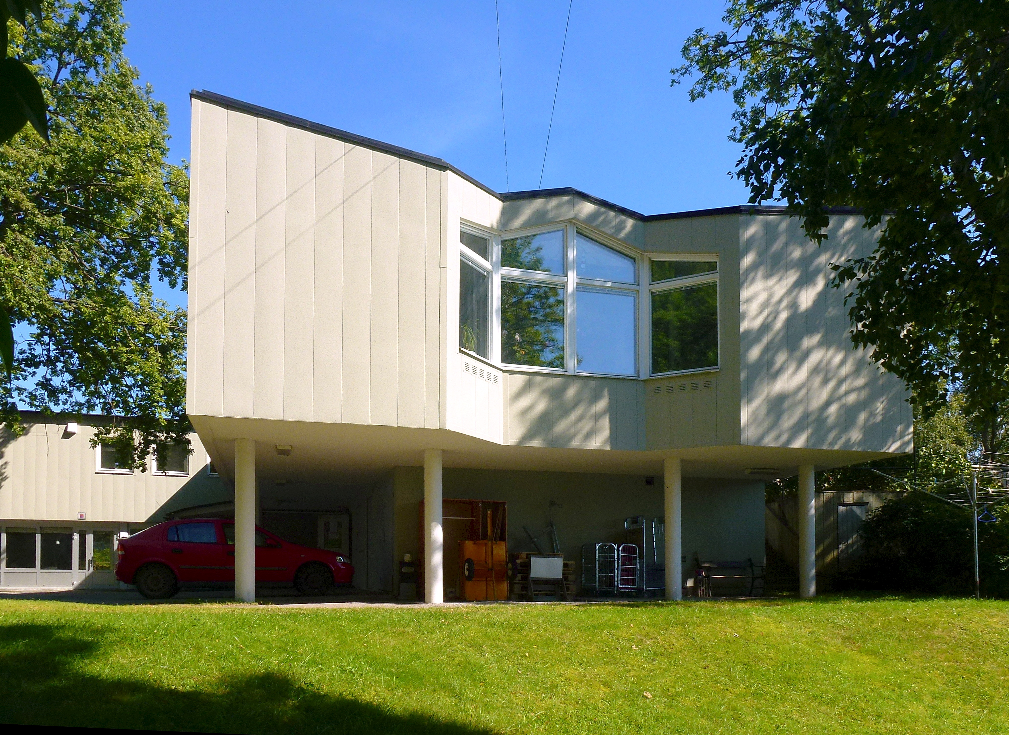 Gammeluddens hem, tillbyggnad från 1960-talet